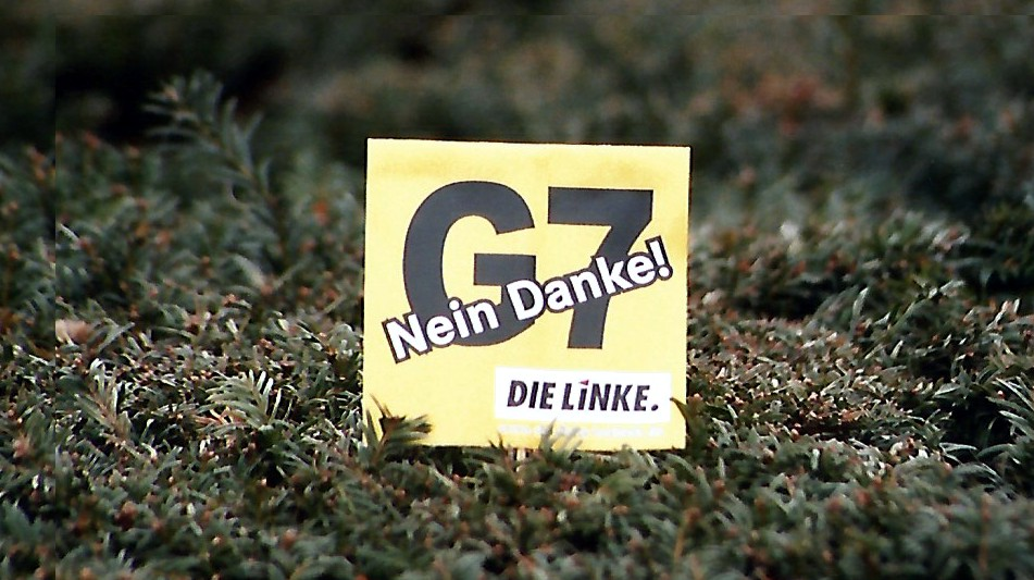 Gegenpropagandaaktion der Linken (ex. SED)